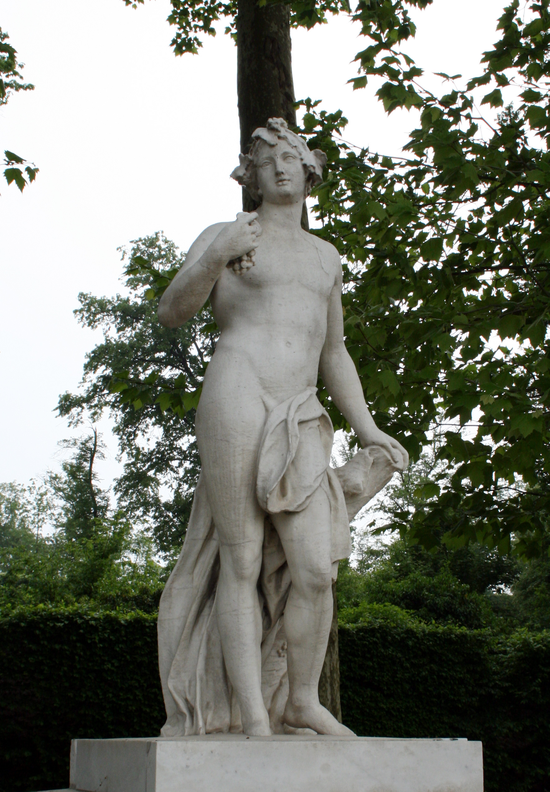 Robert Le Lorrain (French, 1666-1743): Bacchus dans la demi-lune du bassin d'Apollon du parc de Versailles